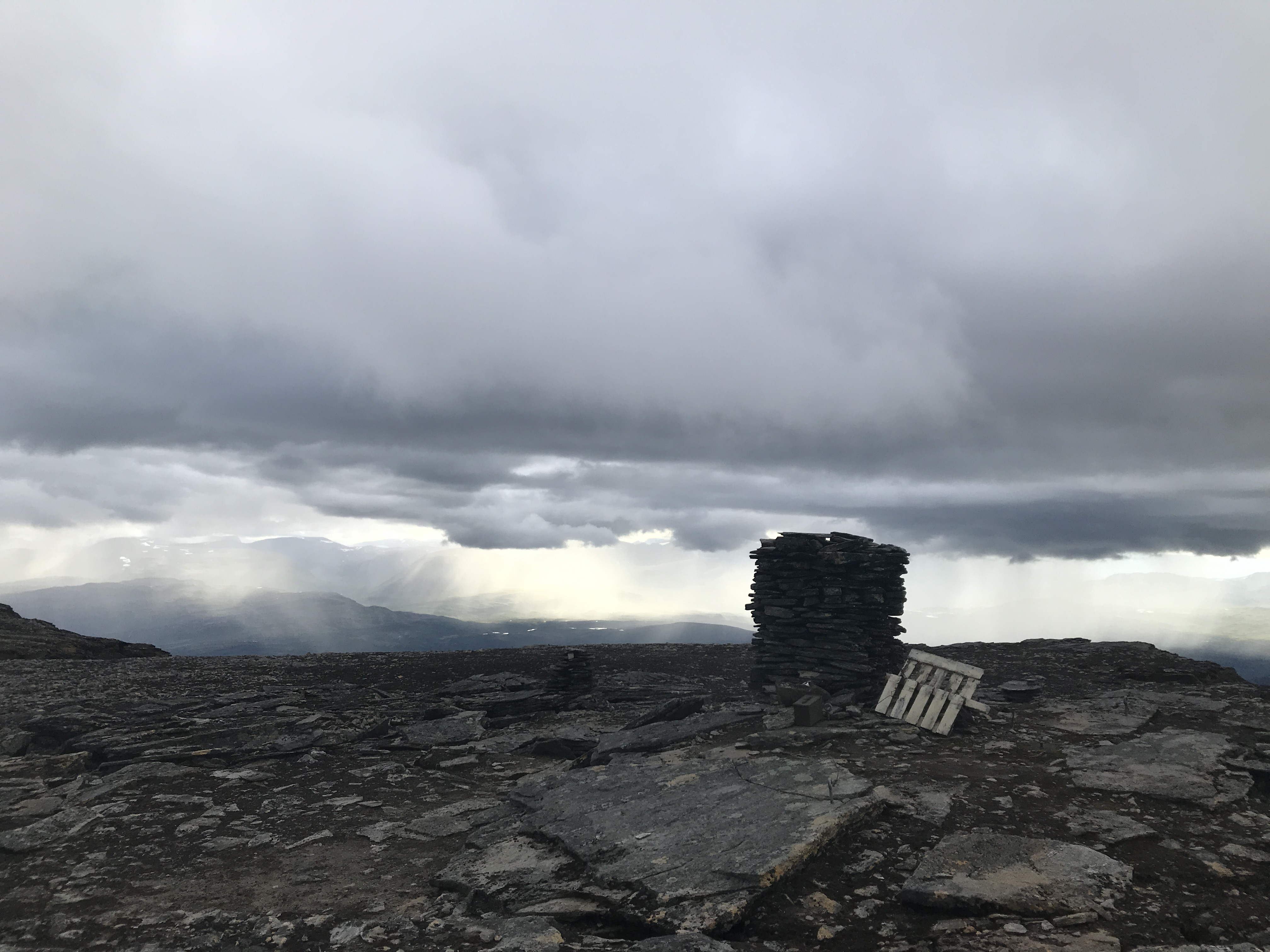 Den ene av to varder på Rostafjellet. Varden på bildet står 1541 moh.